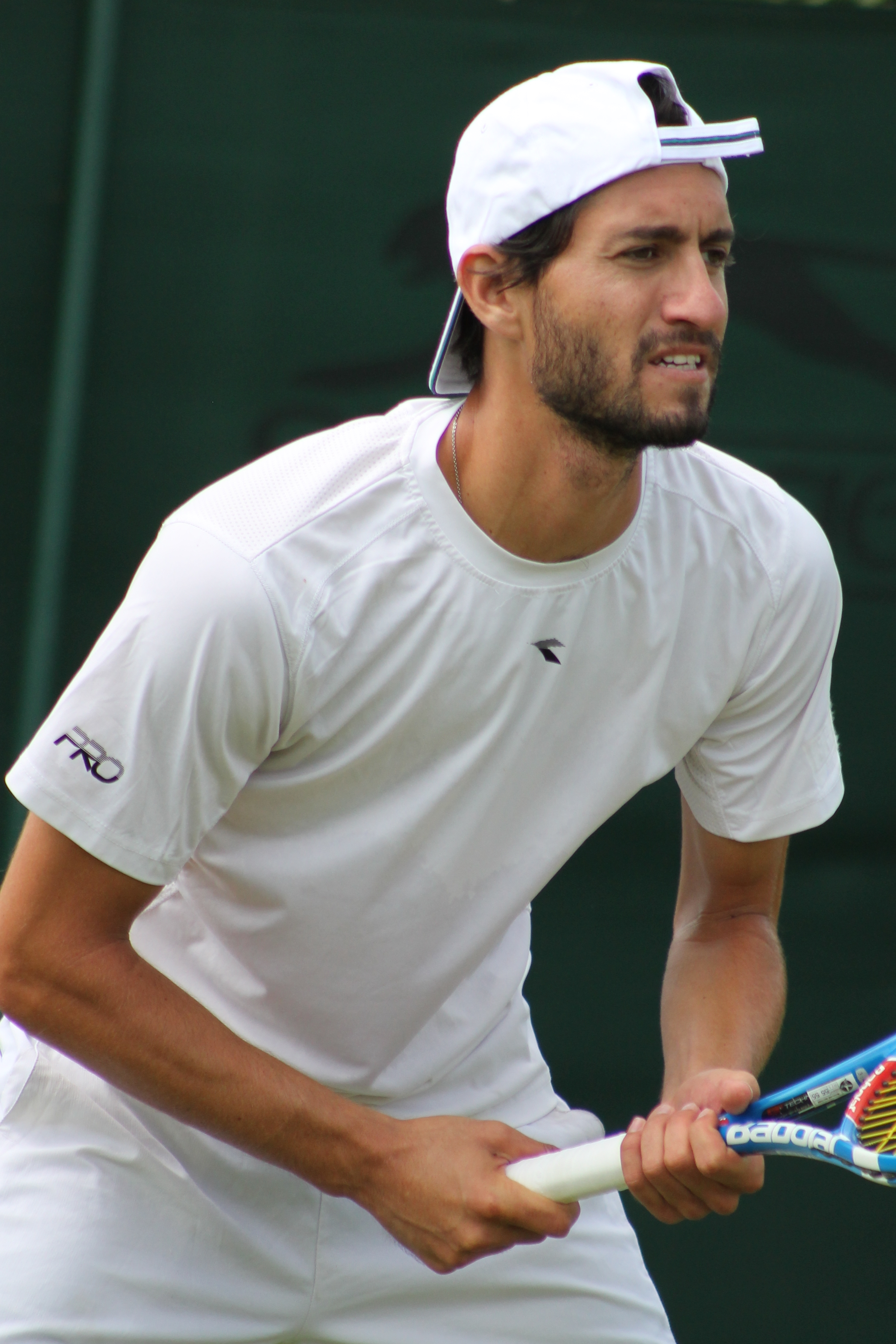 Weintraub WMQ15 (10)